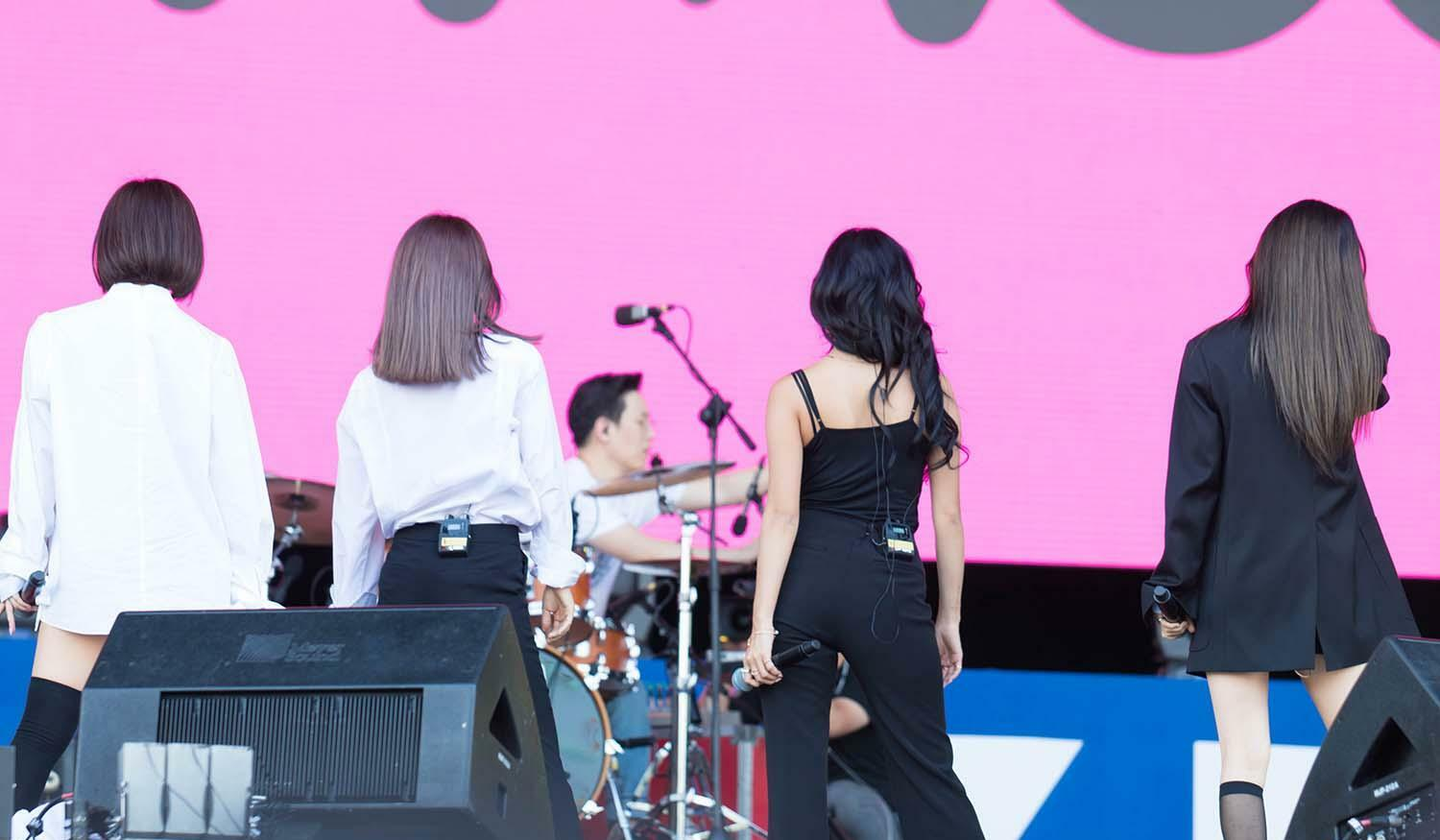 17.09.23 조이올팍페스티벌 - 마마무(MAMAMOO)